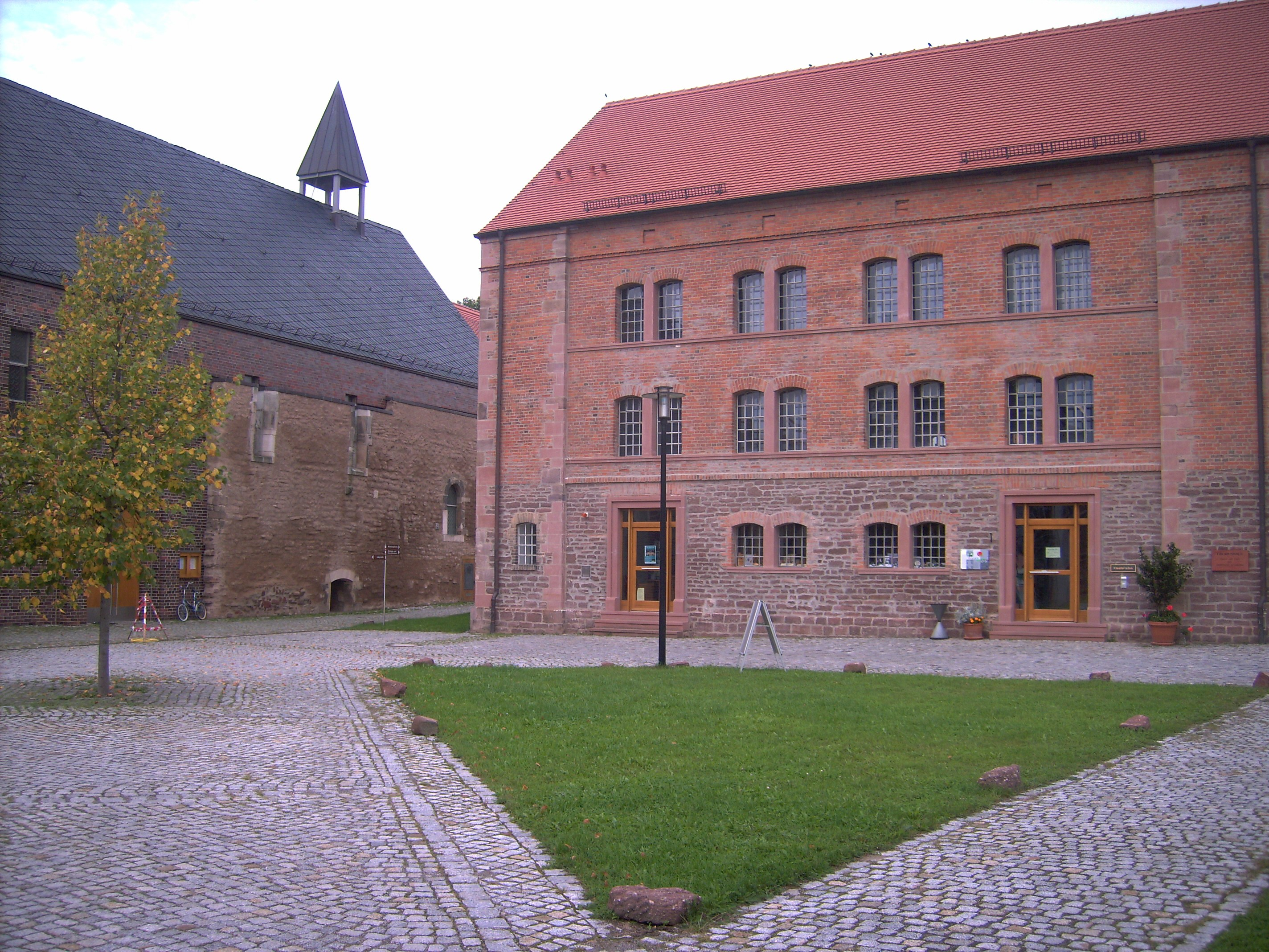 Kloster St. Marien zu Helfta, Klosterkirche und Liboriushaus